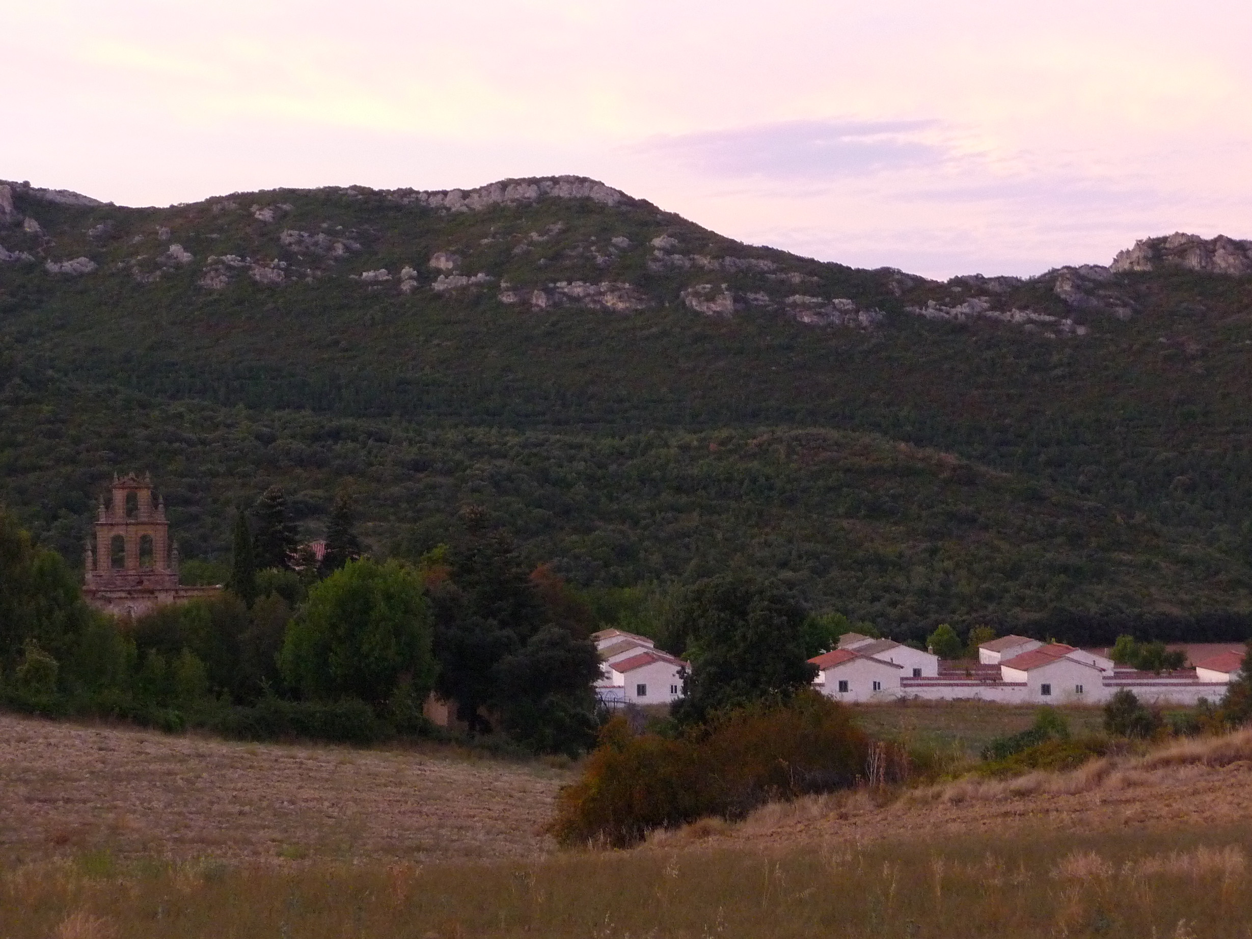 Vista general del Monasterio de Herrera en la provincia de Burgos. España.